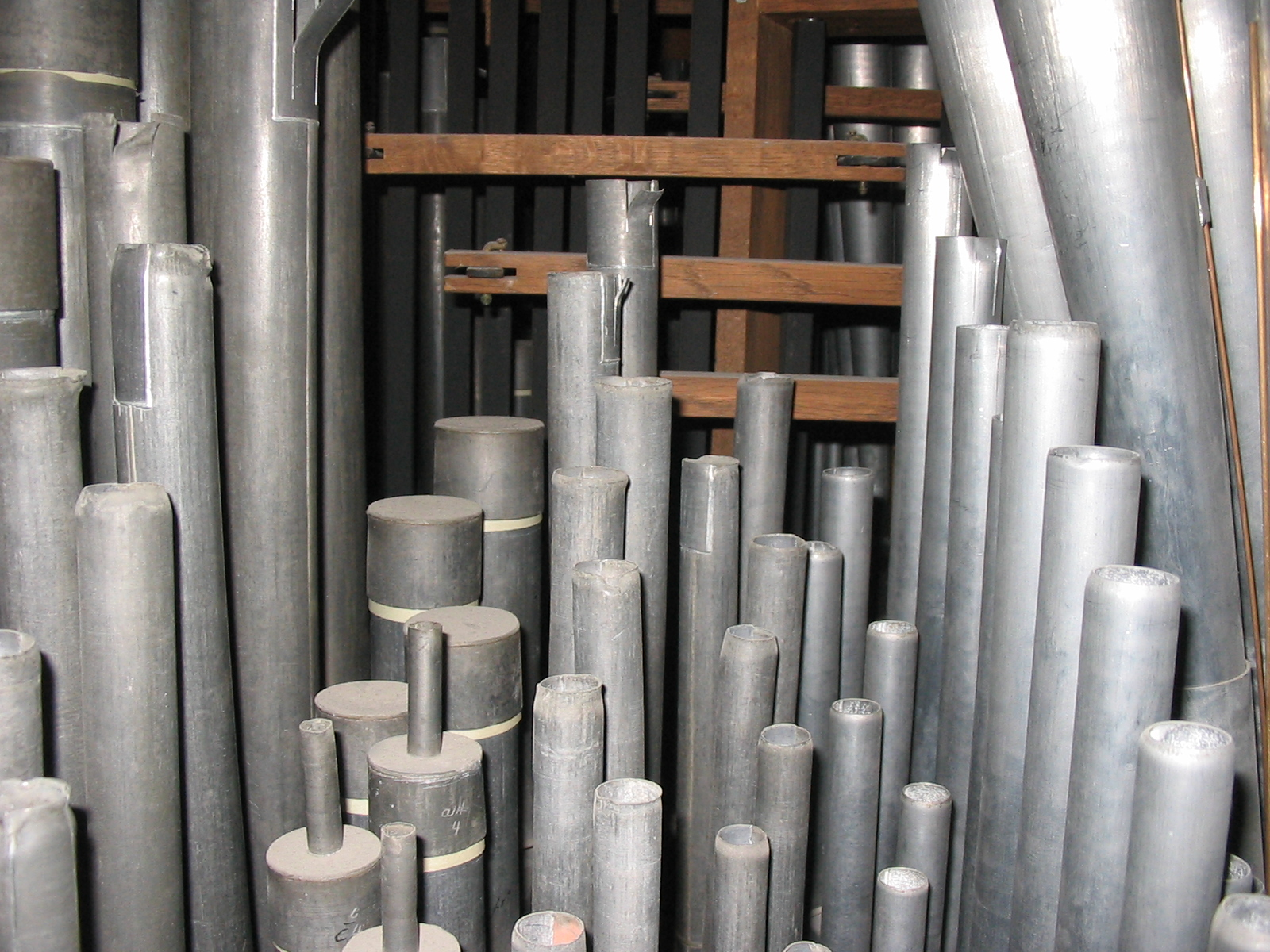 Hoofdwerk orgel dorpskerk katwijk